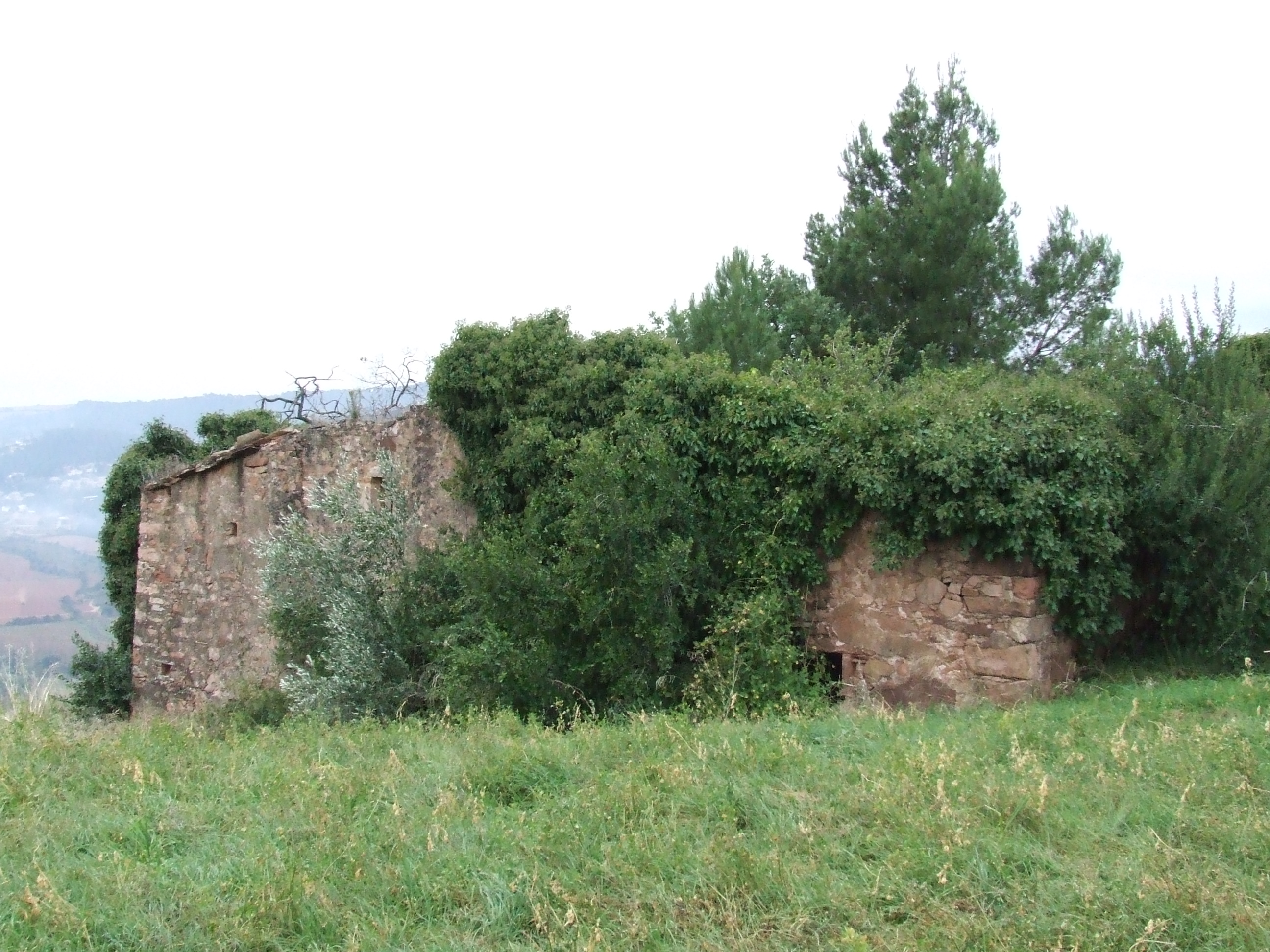 Can Vileu (Riells del Fai, Bigues i Riells, Vallès Oriental)